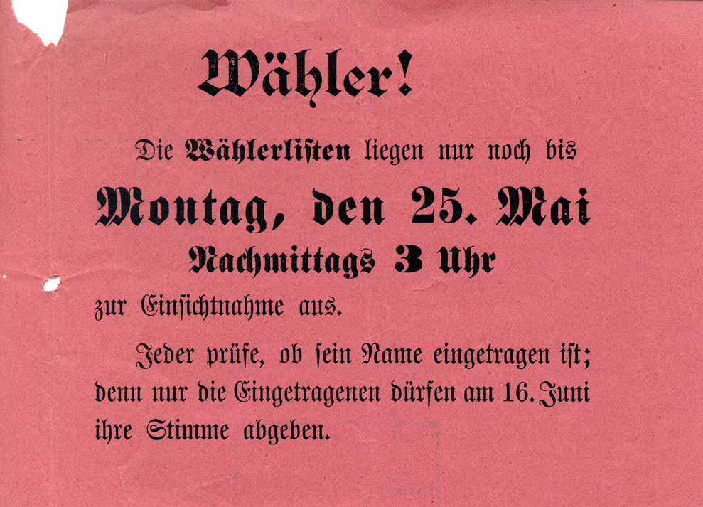 Reichstagswahl 1903, Aufruf an die Wahlberechtigten, die Wahllisten zu überprüfen.